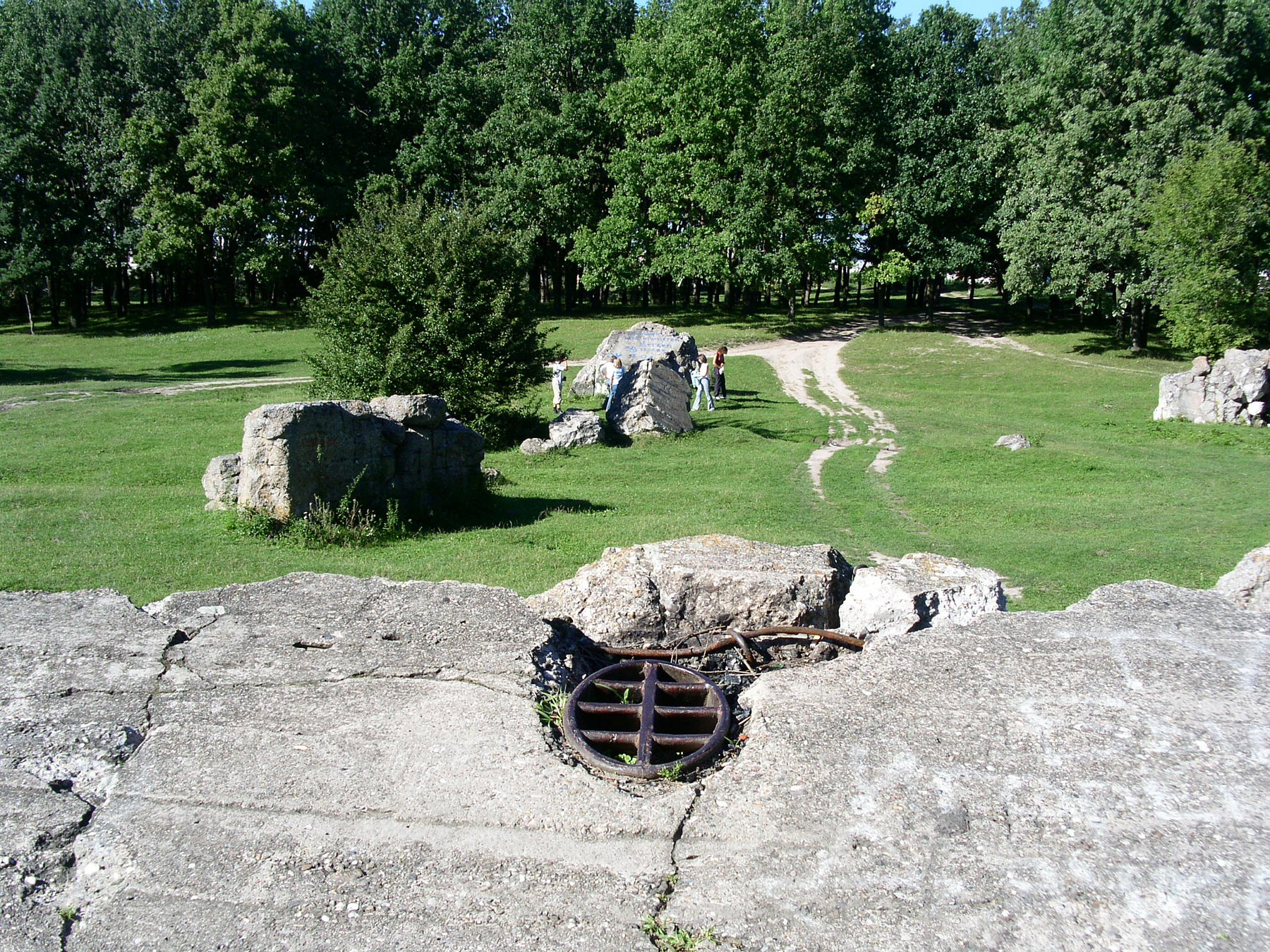 Wehrwolf just outside Vinnytsia, Ukraine.